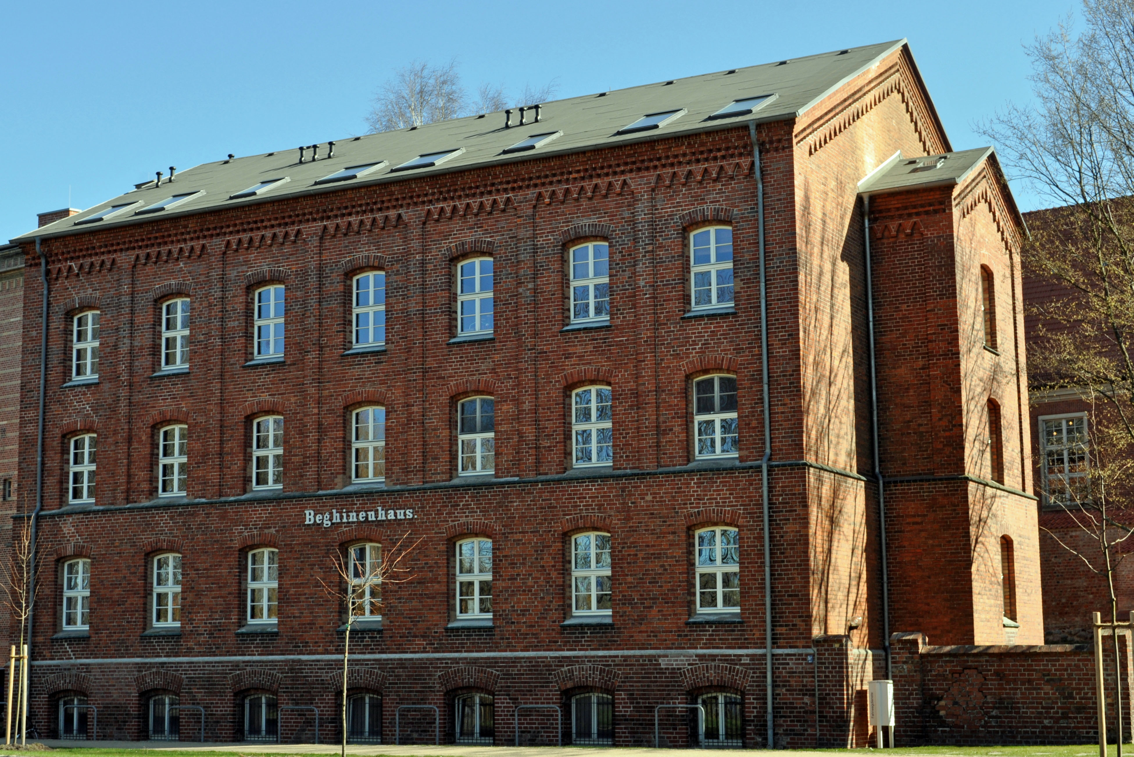 Gebäude bzw. Gebäudedetail in Stralsund. Straße und Hausnummer siehe Dateiname.